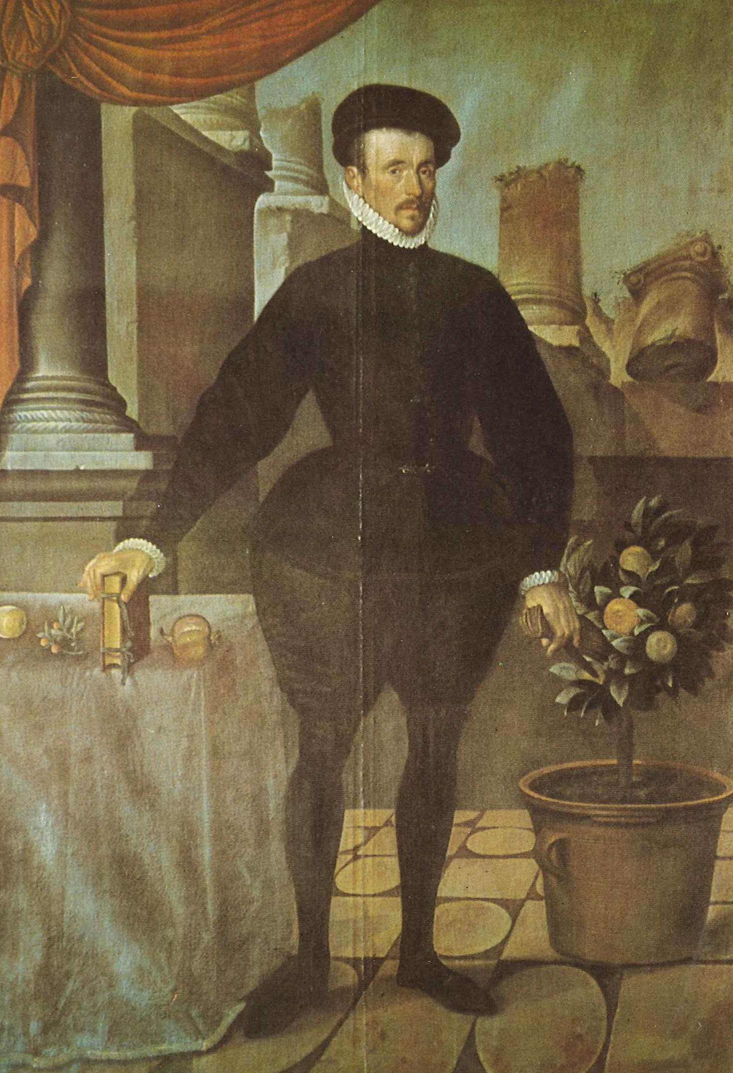 Der Basler Stadtarzt und Professor der Medizin Felix Platter der Jüngere (1536–1614) mit exotischen Pflanzen und antiken Ruinen. Platter war europaweit bekannt als Sammler von Antiquitäten und weiterer wissenschaftlich wertvoller Objekte. Er hatte auch einen eigenen botanischen Garten und legte als einer der ersten Wissenschaftler ein Herbarium an. Das Gemälde befindet sich im Regenzzimmer des Kollegienhauses der Universität Basel.